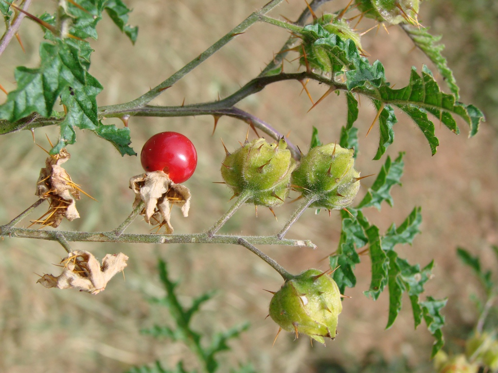 Solanum sisymbriifolium Lam. - (Sin. Solanum balbisii Dunal) - SOLANACEAE - APA da Bacia do Rio São Bartolomeu - Brasília - Distrito Federal - Brasil.